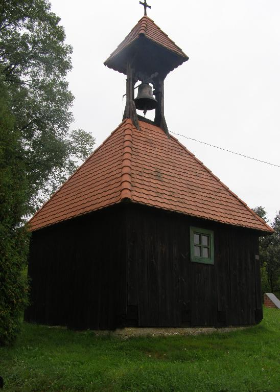 hu:1823-ban épült orfalui szoknyás harangláb. hu:2001-ben került felújításra.